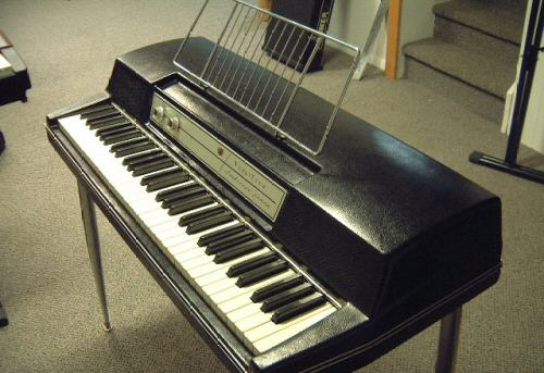 Ein Wurlitzer 200A Quelle: Selbst gemacht --Fetz 17:46, 15. Apr 2006 (CEST)